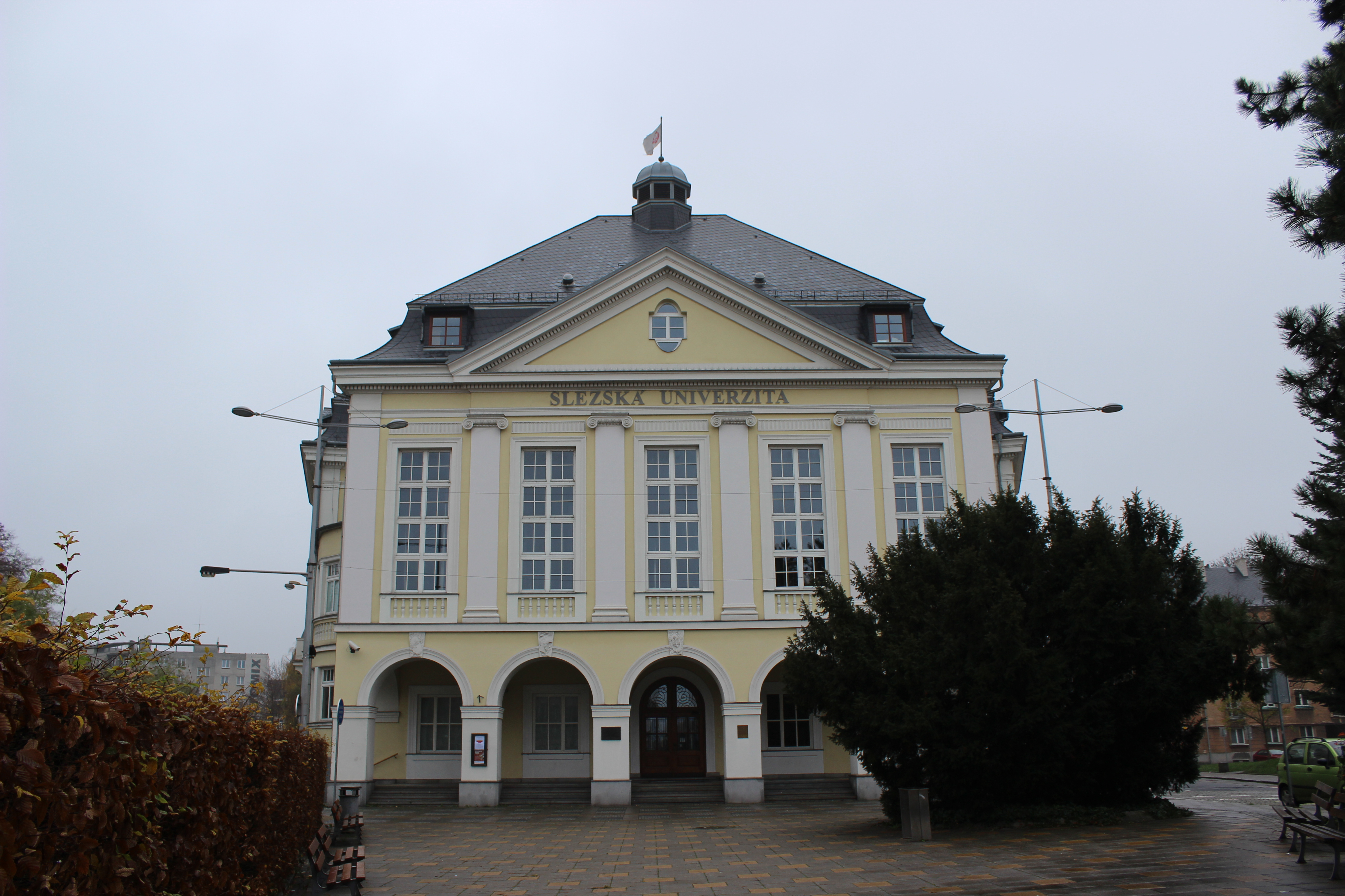 Budova Slezské univerzity v Opavě (pohled od severu).